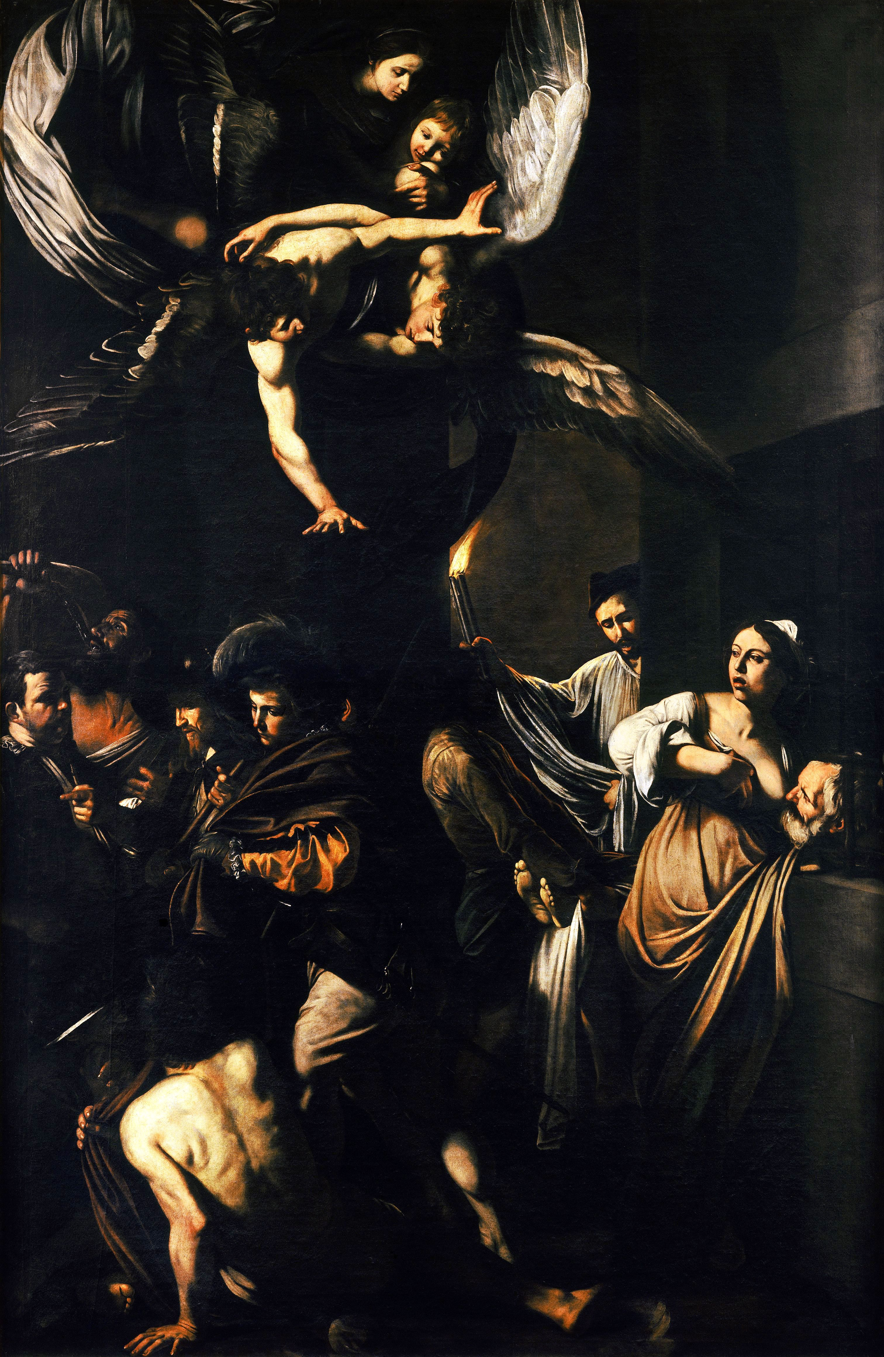 Caravaggio - Sette opere di Misericordia (1607, Pio Monte della Misericordia - Naples)